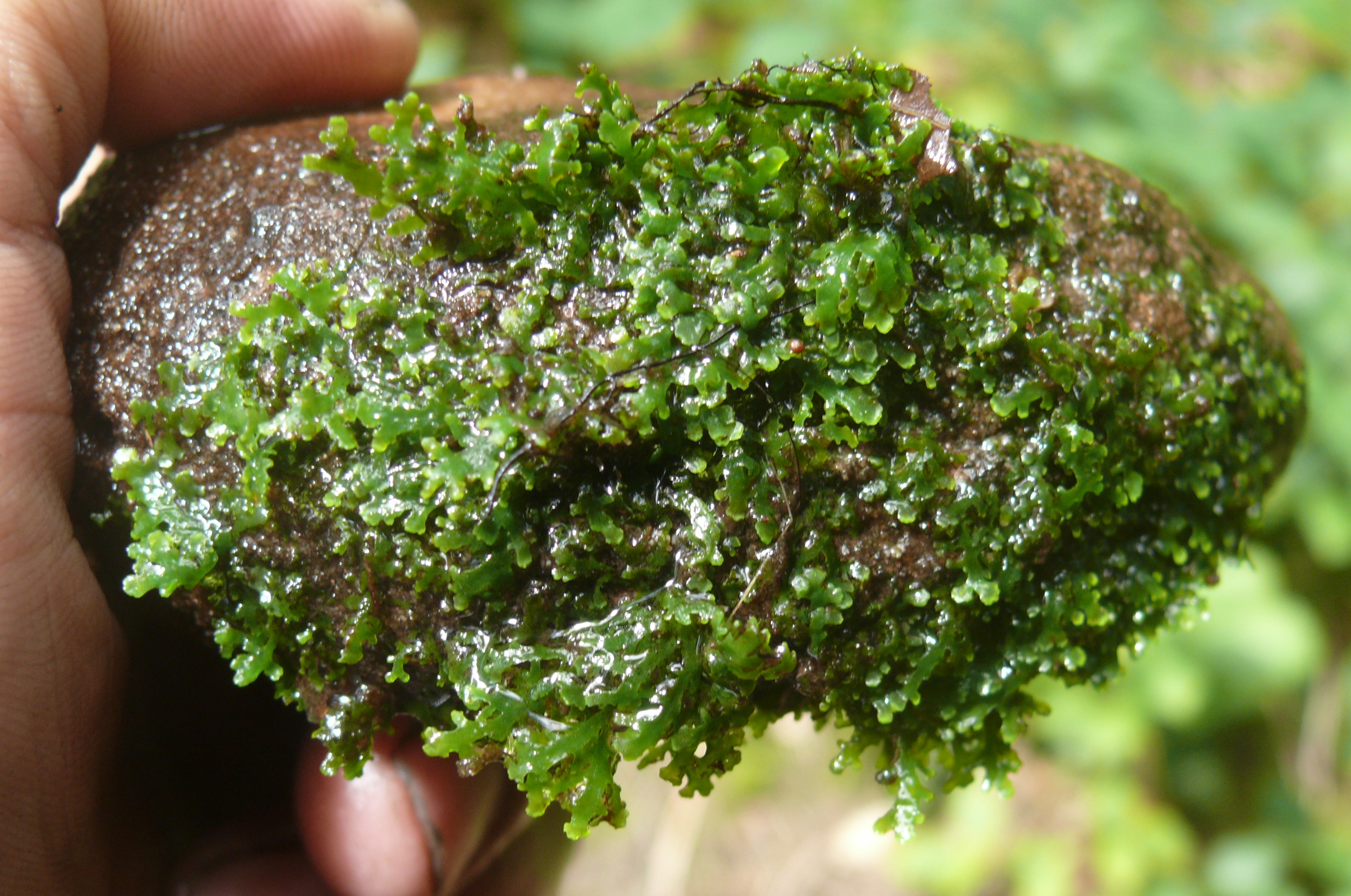 Riccardia chamaedryfolia, Nordschwarzwald